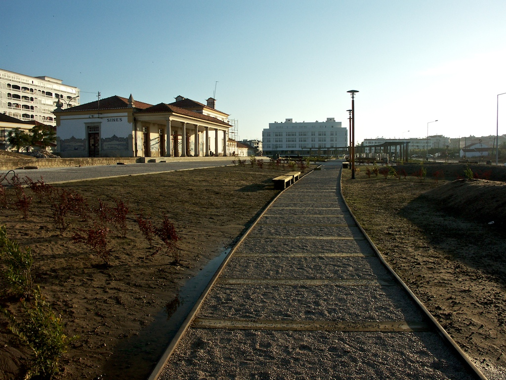 Tipo: E Estação Local: Sines Ramal de Sines, PK 177 Data e hora: 28 de Julho de 2006 19h29